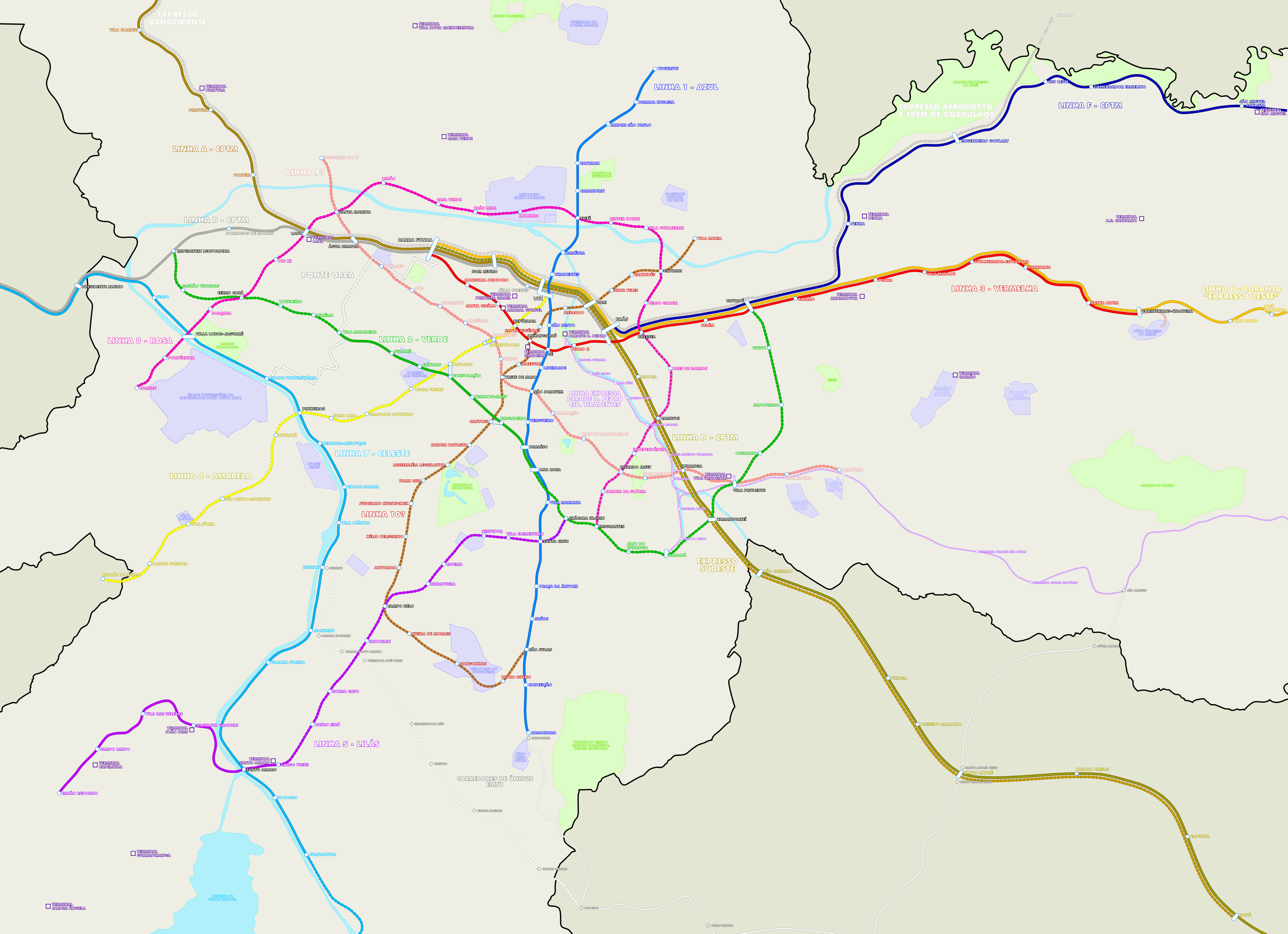 Projetos Propostos do metrô de SP, sem data definida.